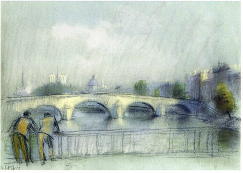 Peinture d'un pont de Paris, par Ramin Gaya ?